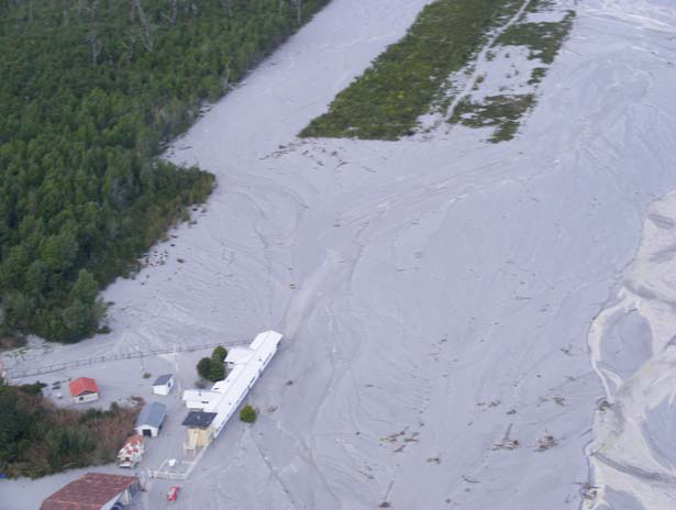 Aeródromo de Chaitén completamente inundado por las aguas del río Blanco, durante la erupción del volcán Chaitén en 2008.